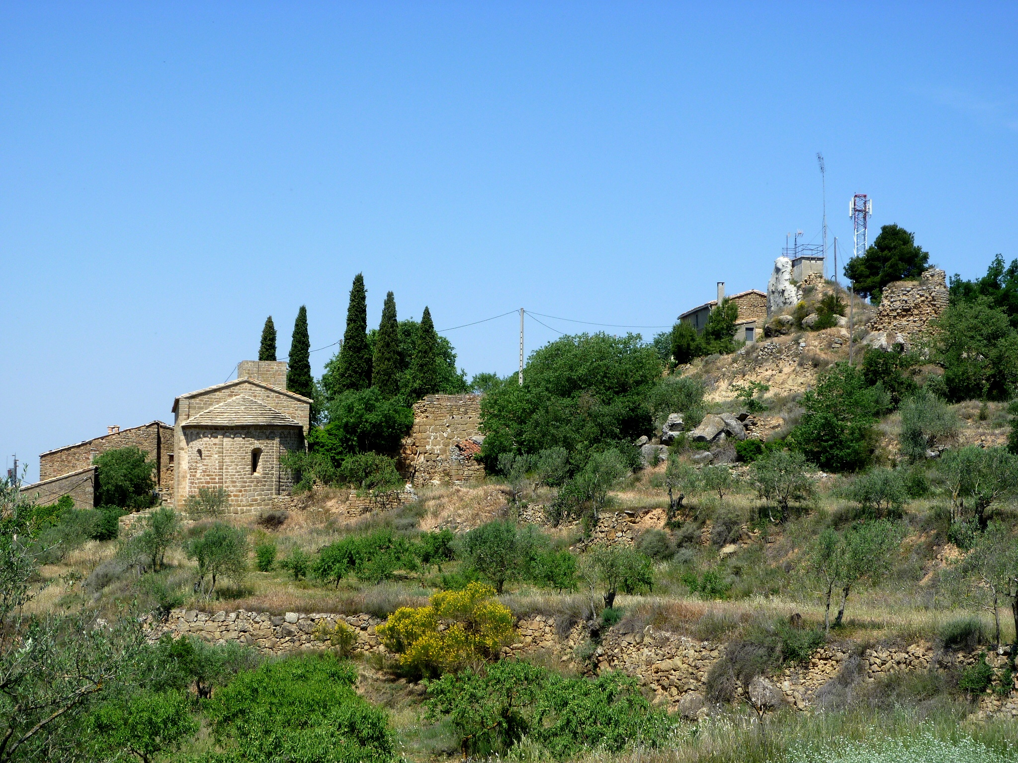 Antic Castell de l'Aguda (Torà), sobre l'església de Santa Maria